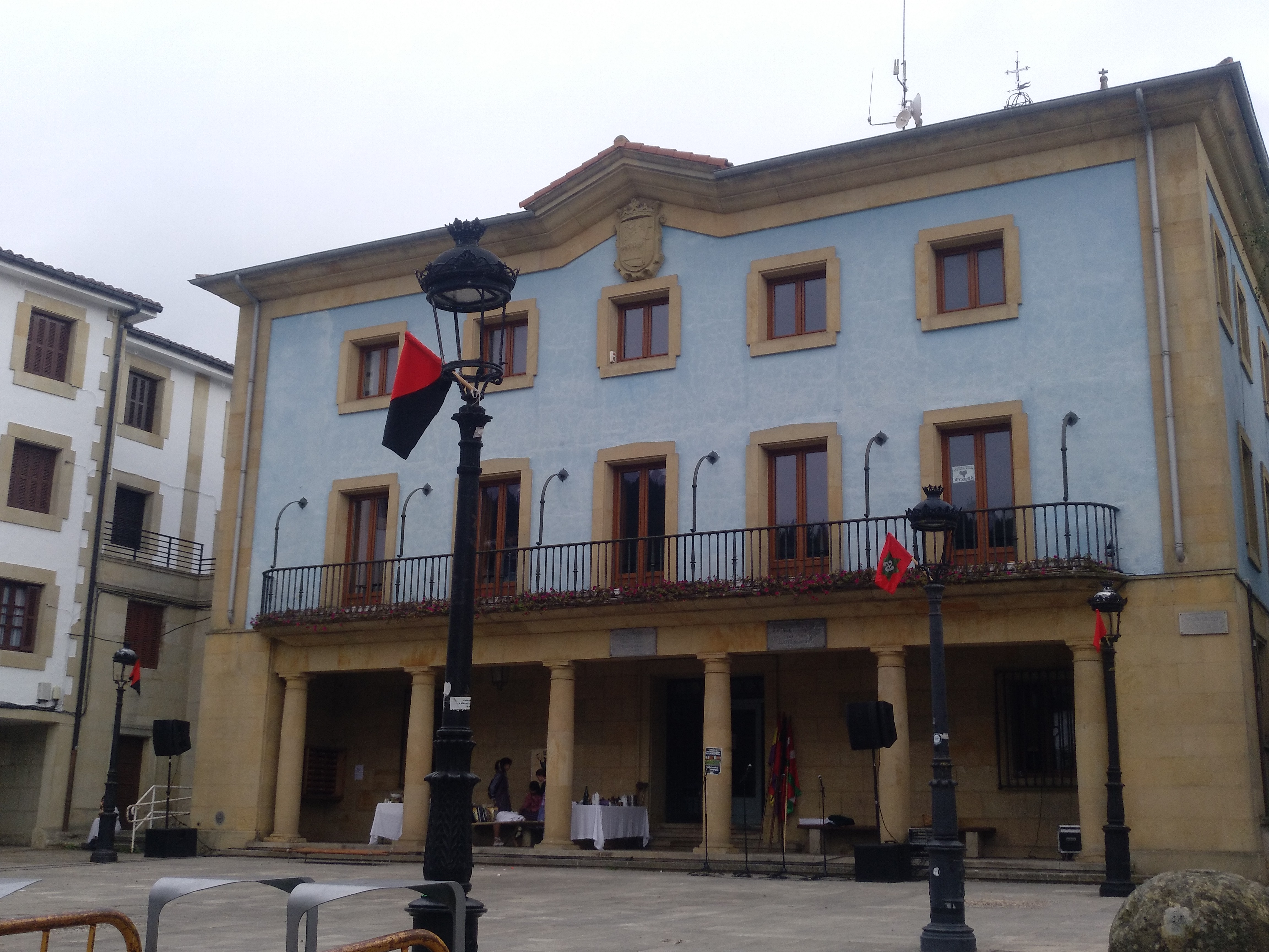 Elgetako udaletxea